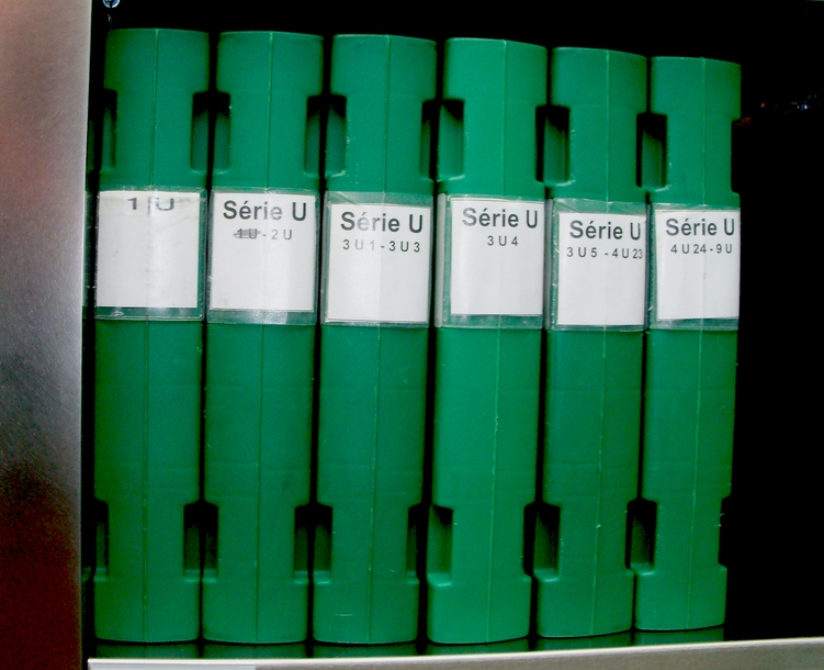 Répertoires de la série U dans la salle de lecture des Archives départementales d'Ille-et-Vilaine.